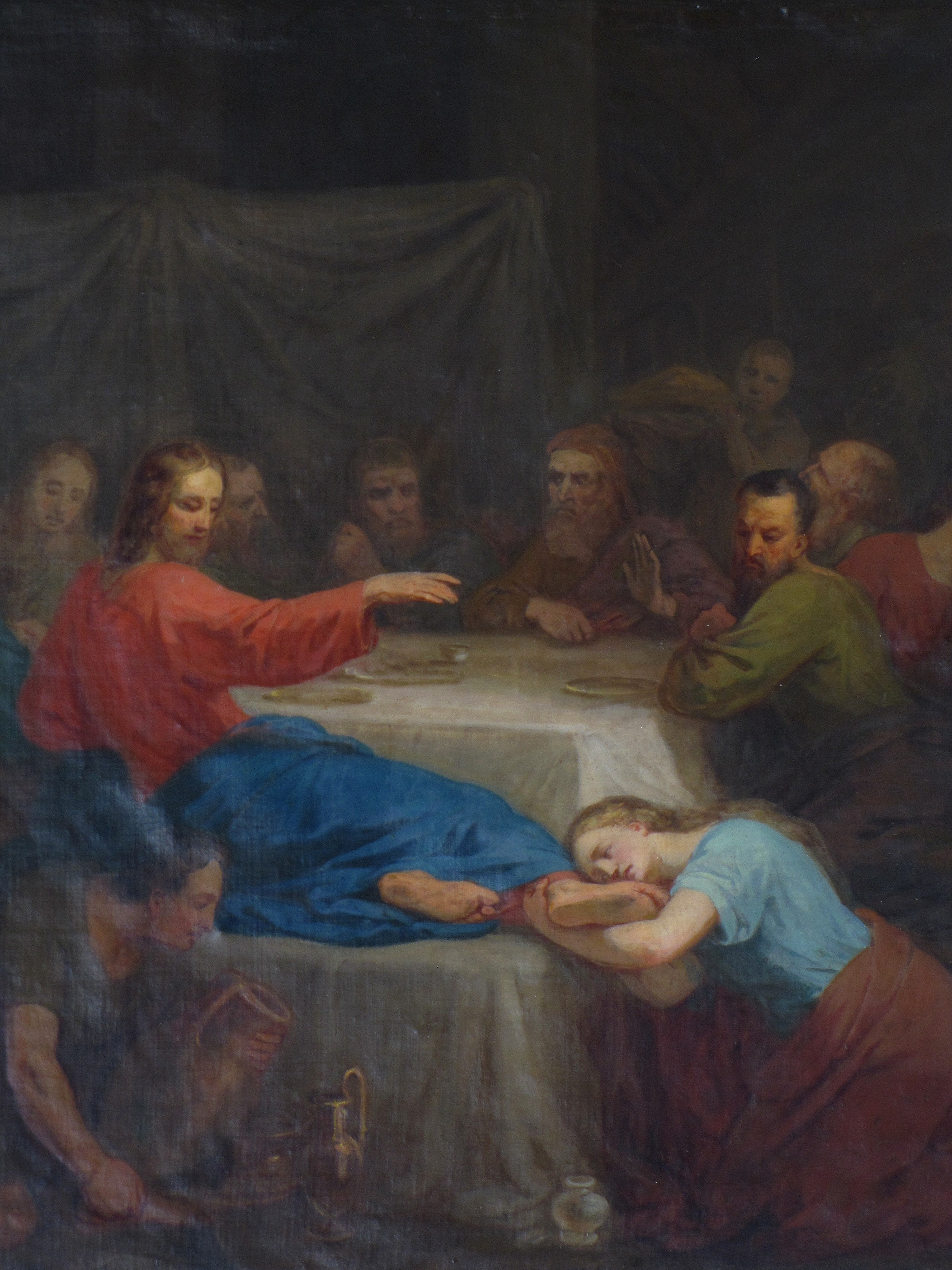 Alsace, Bas-Rhin, Wolxheim, Église Saint-Étienne (IA67011827). Tableau "Repas chez Simon" (Michel OSTER, huile sur toile, 115x110, XIXe): This object is classé Monument Historique in the base Palissy, database of the French furniture patrimony of the French ministry of culture, under the references PM67000483 and IM67021260.